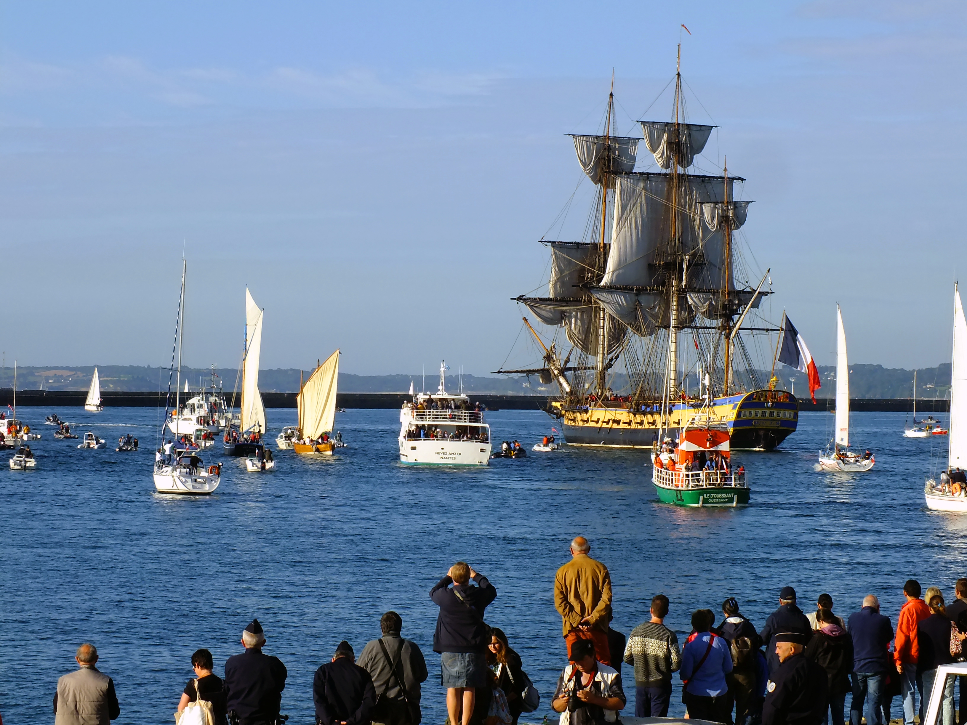 Départ de l'Hermione le 17 août 2015.